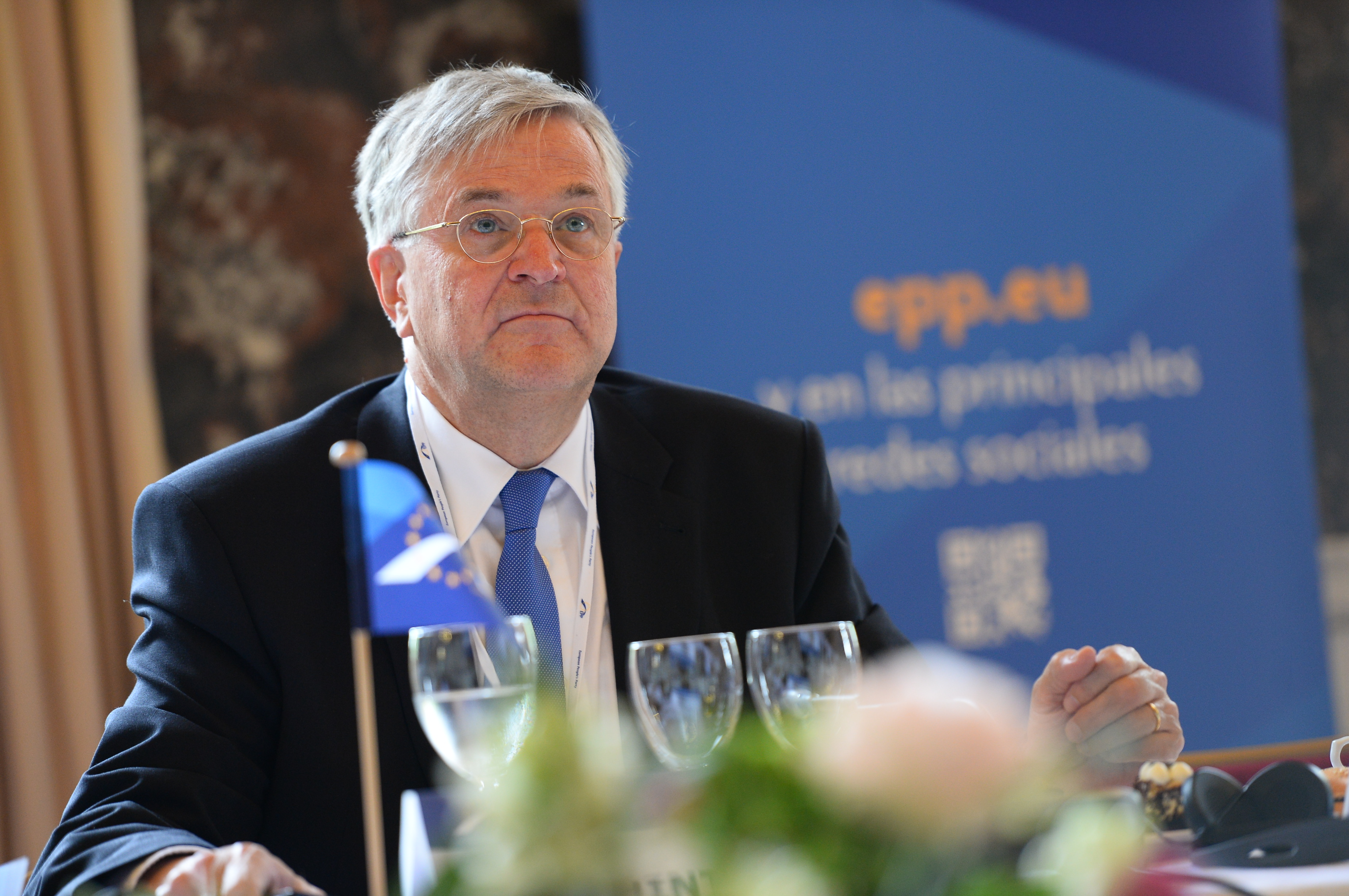 EPP Summit, Brussels, May 2014